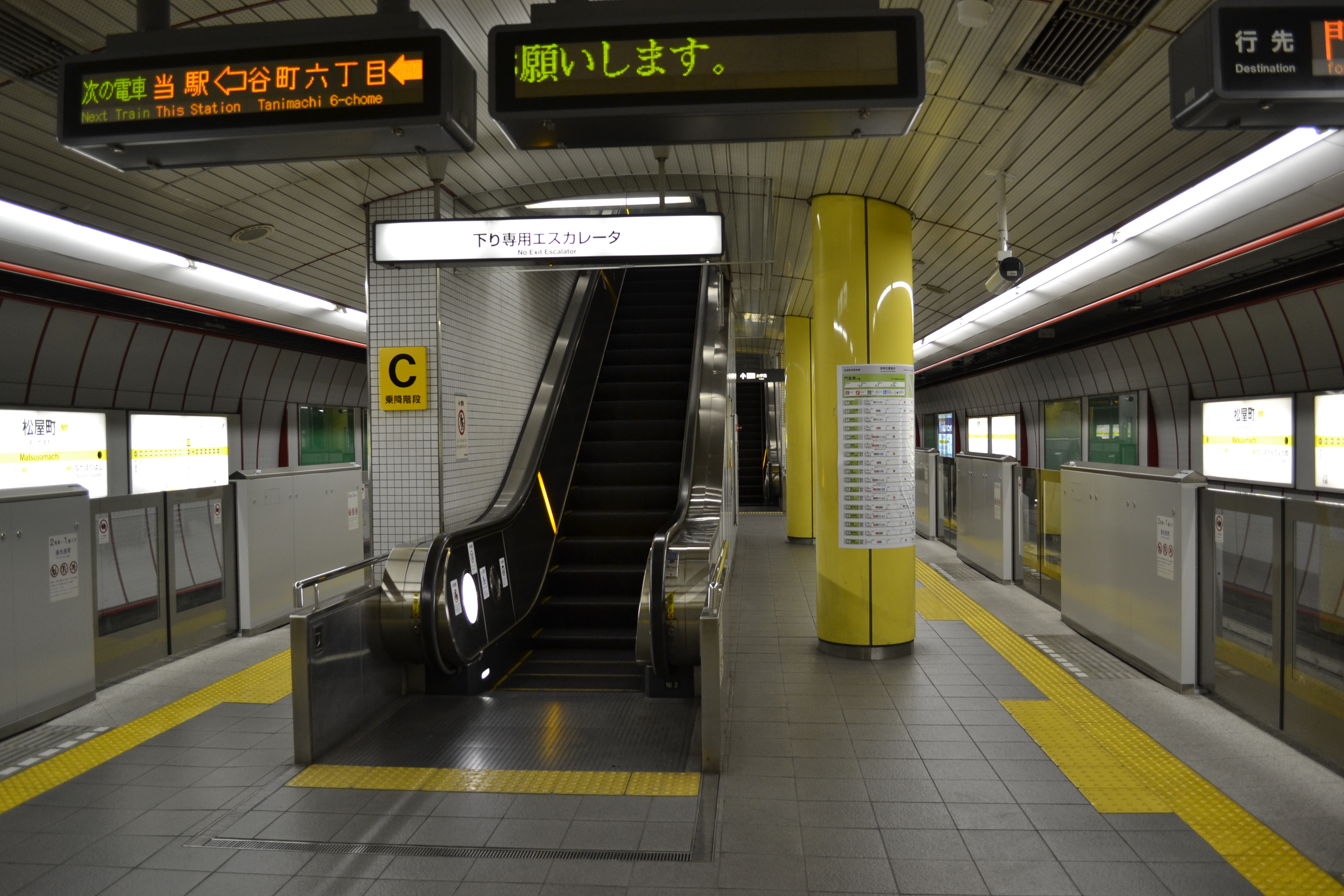 松屋町駅プラットホーム